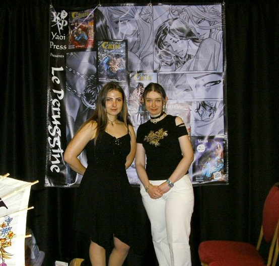 Le Peruggine alla manifestazione Yaoi Jamboree 2008 a Phoenix, Usa.